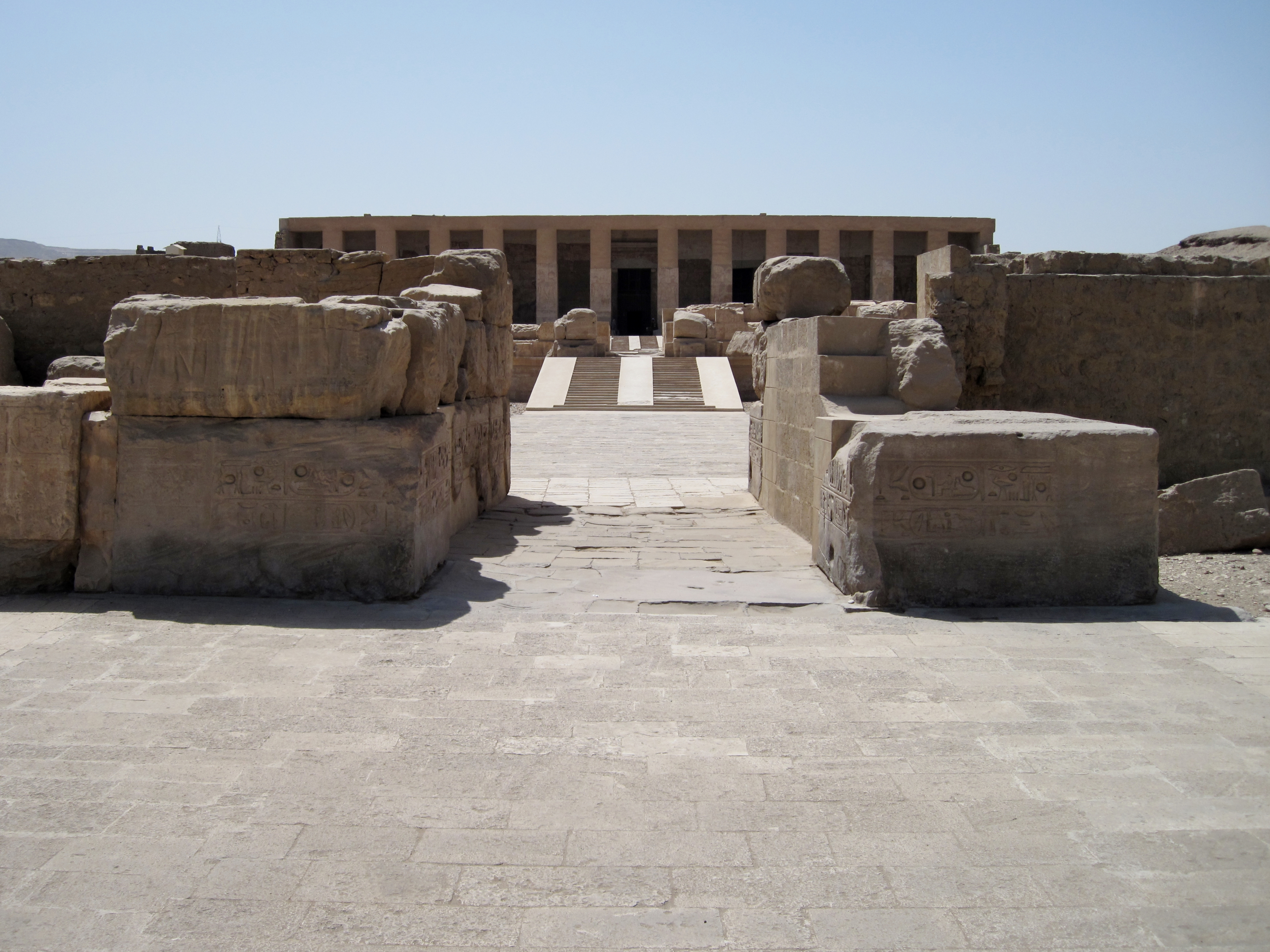 Totentempel Sethos I. in Abydos, Ägypten